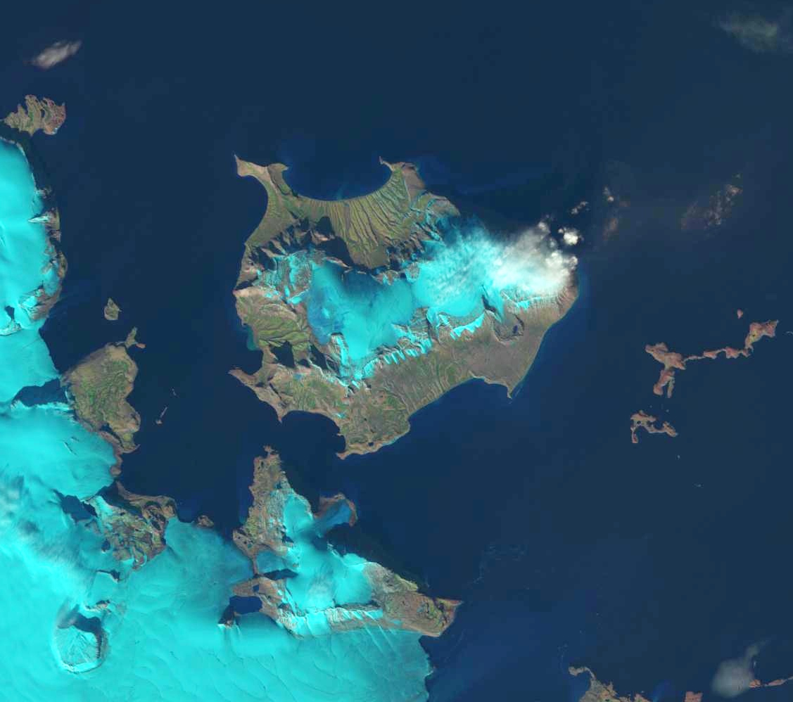 Landsat8 Satellitenbild von Wilhelmøya - 14. September 2013 - Links teile von Olav V Land (Insel Spitzbergen). dazwischen Bjørnsundet